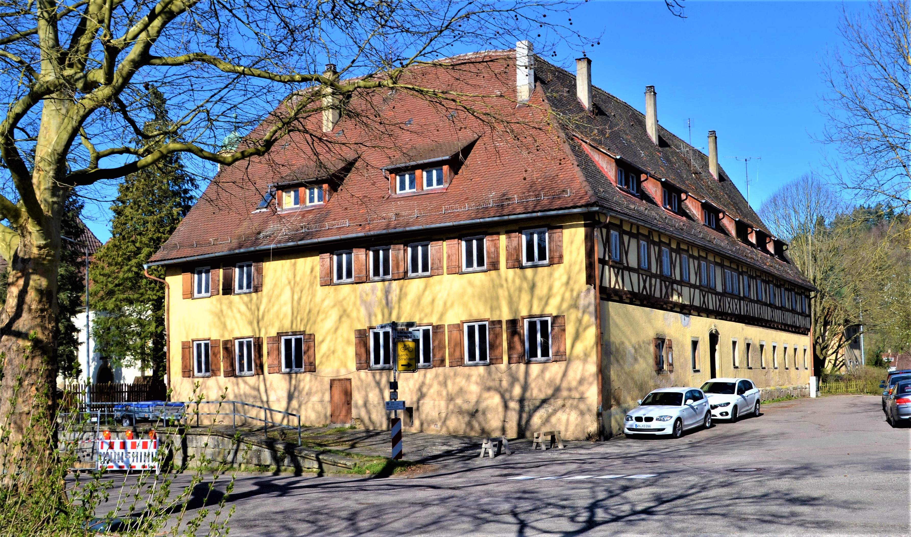 Spitalpfründehaus von St. Katharina in Schwäbisch Gmünd